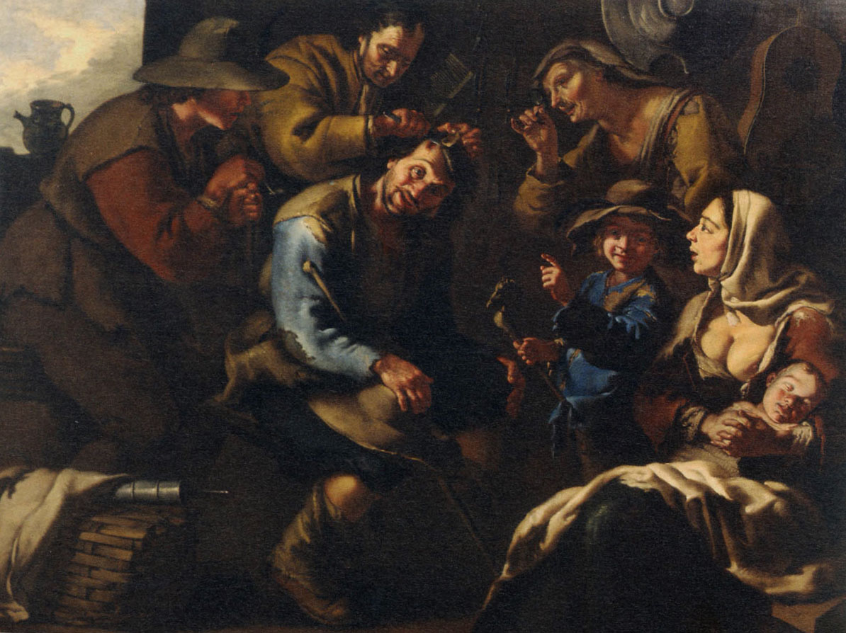 L’Excision de la pierre de folie par Giovanni Francesco Cipper, dit "Il Todeschini" (1664-1736) Huile sur toile - 175 x 229 cm Musée d'Art moderne André Malraux, Le Havre